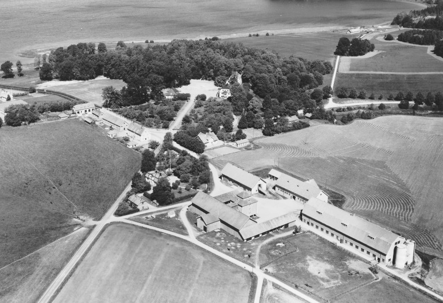 Flygfoto över Fituna gård.